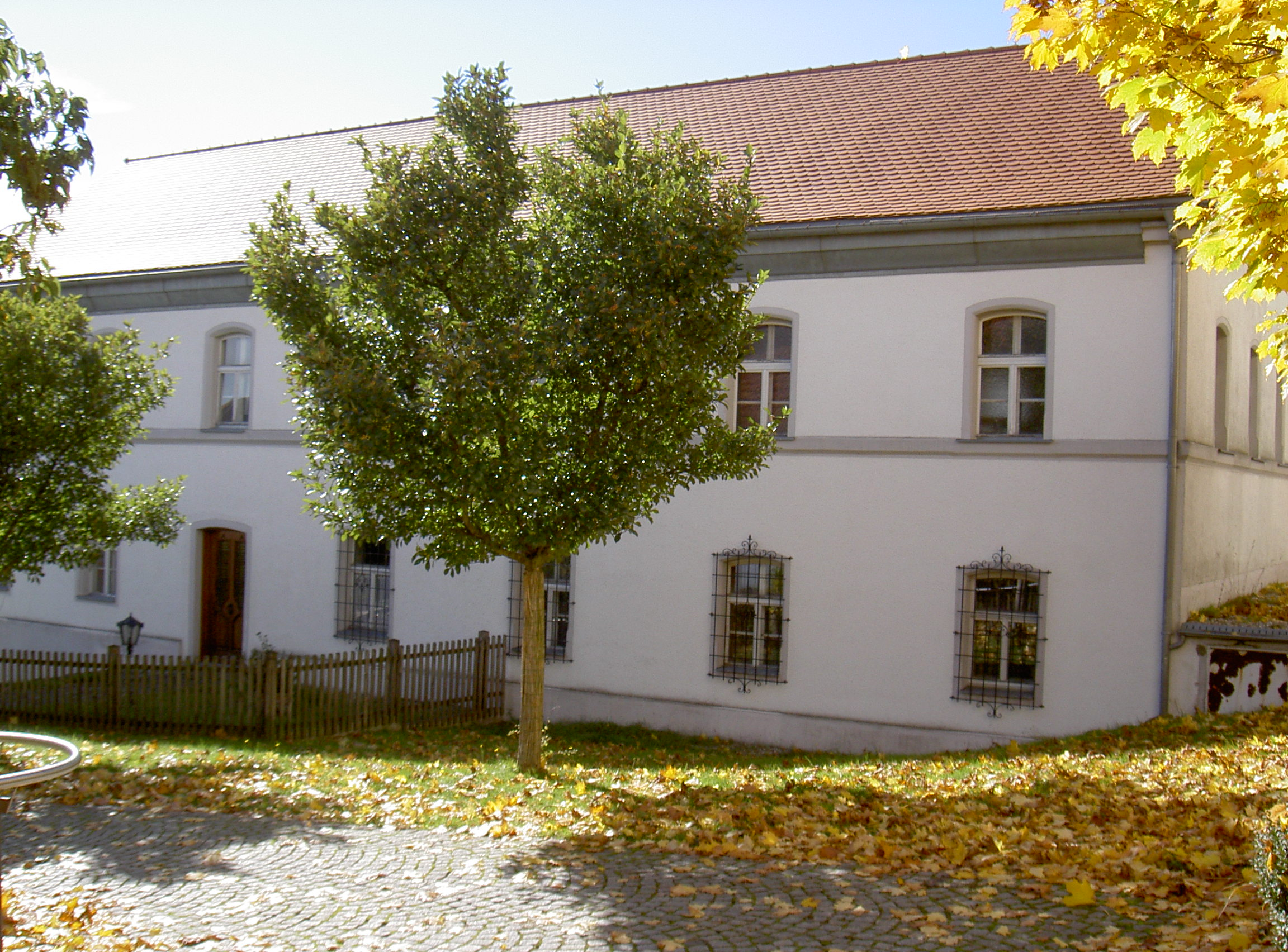 Weiding, ehemaliges Schulhaus